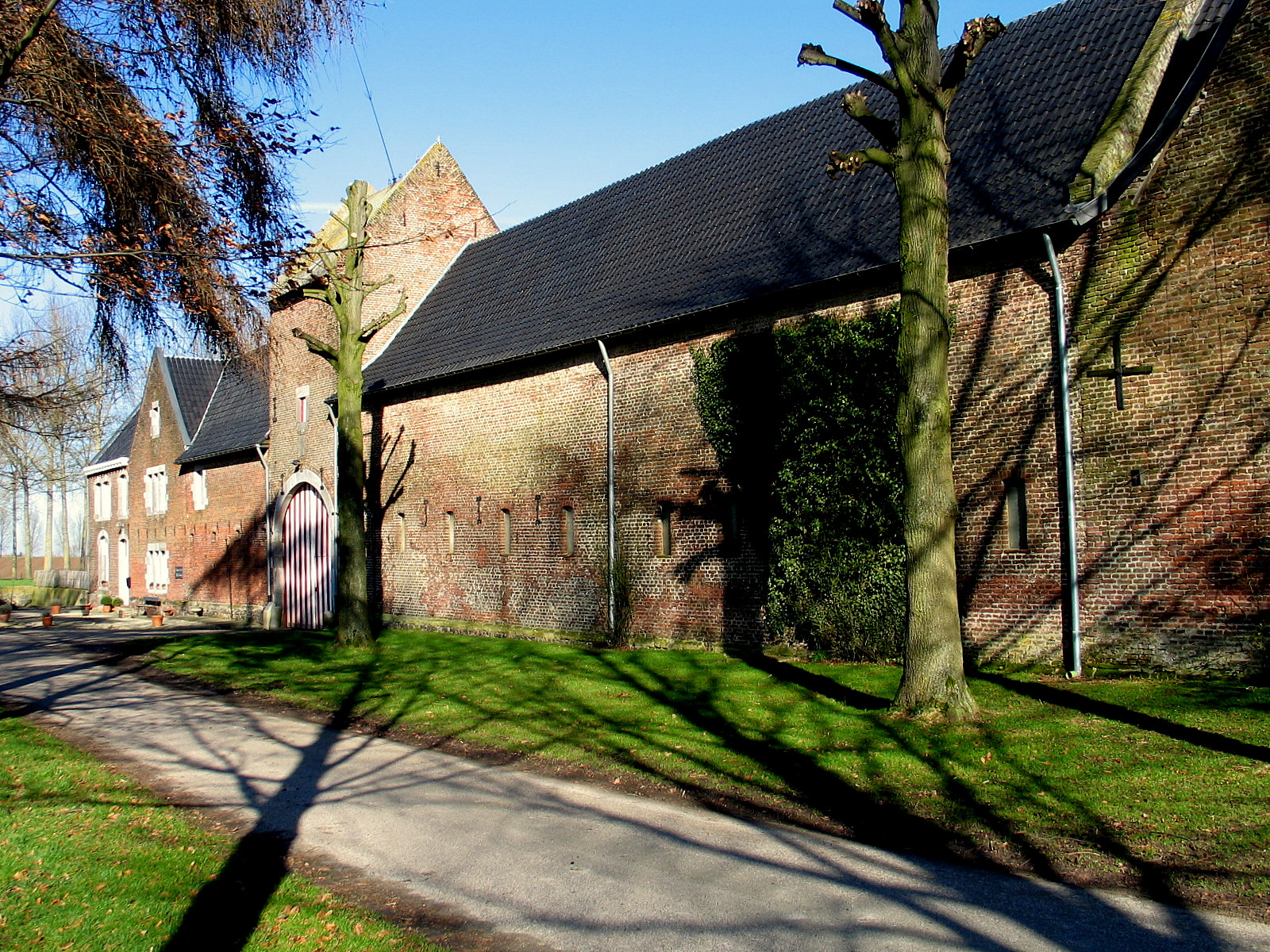 Westzijde van het Kasteel Terhove, Bommershoven, België